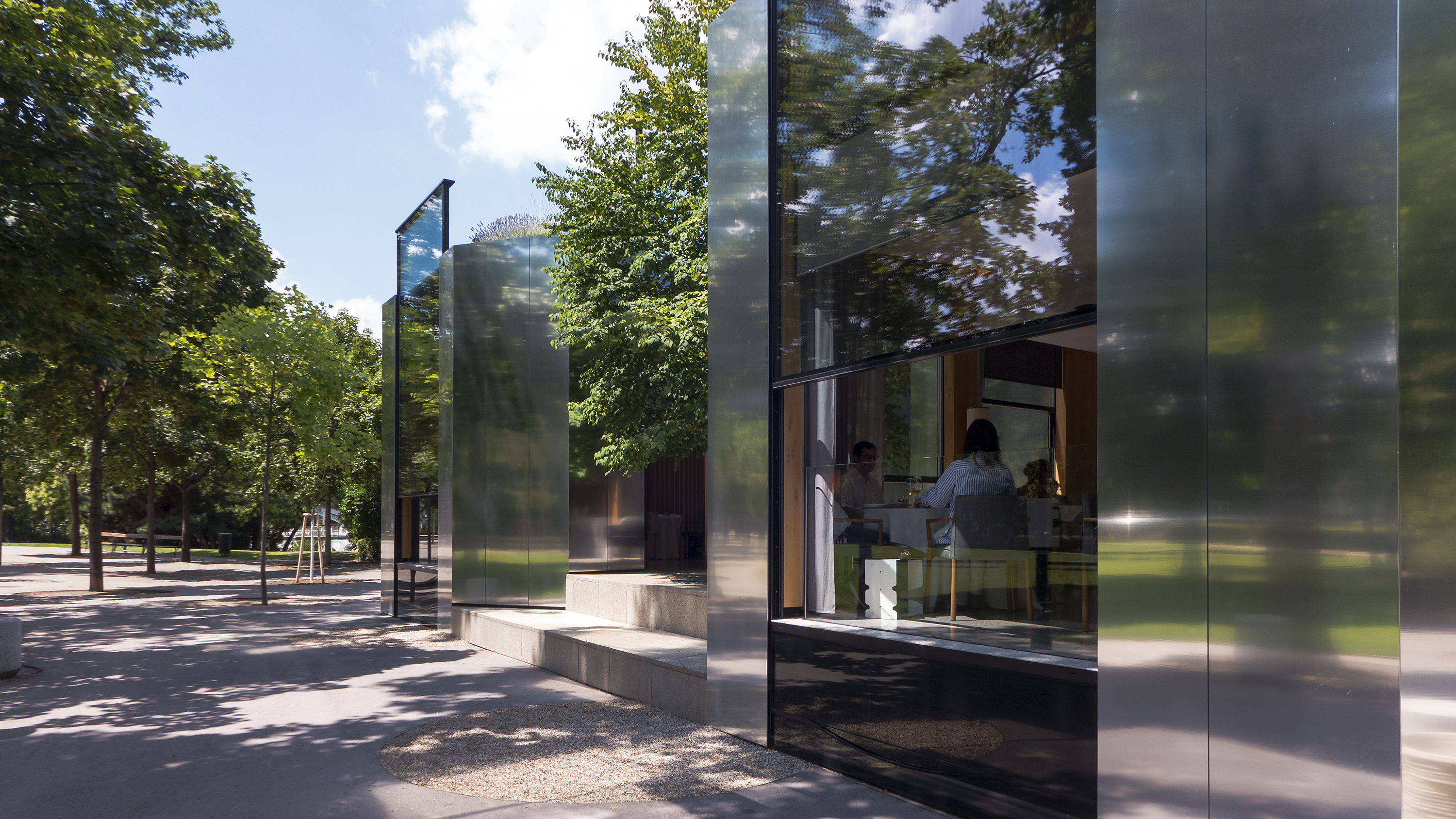 Wiener Stadtpark in Wien 3